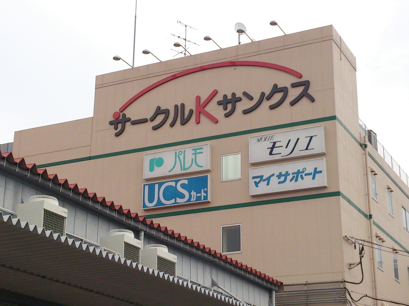 ユニー関連会社